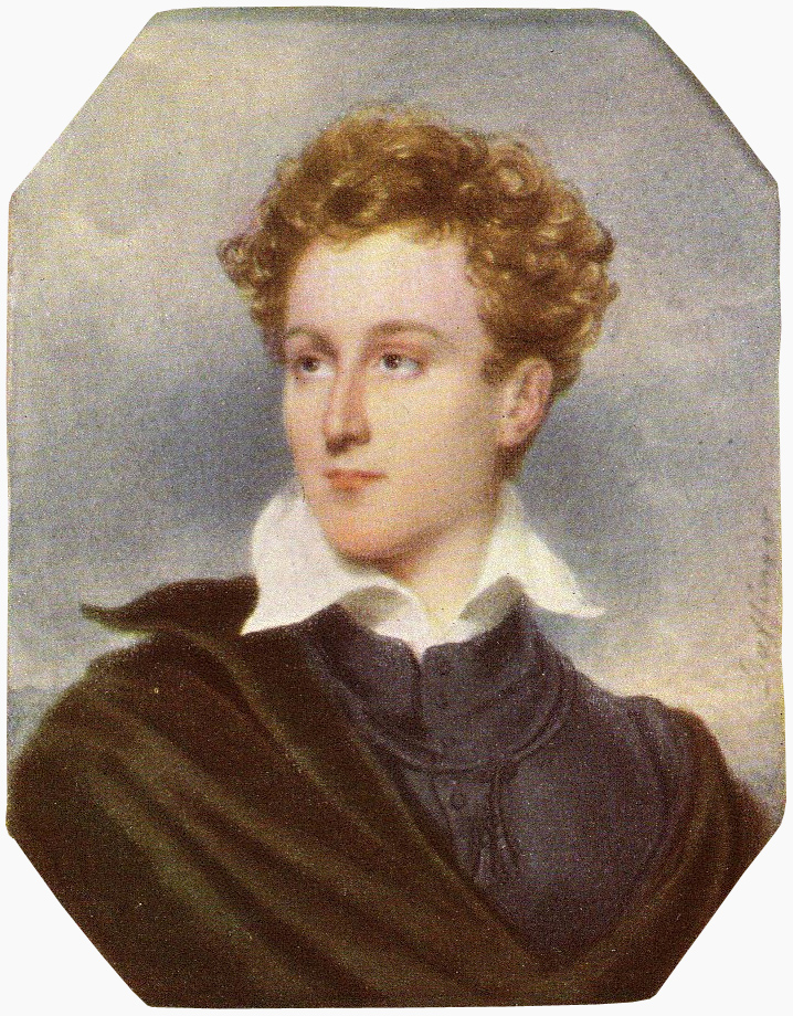 Portrait of Lieutenant Botha